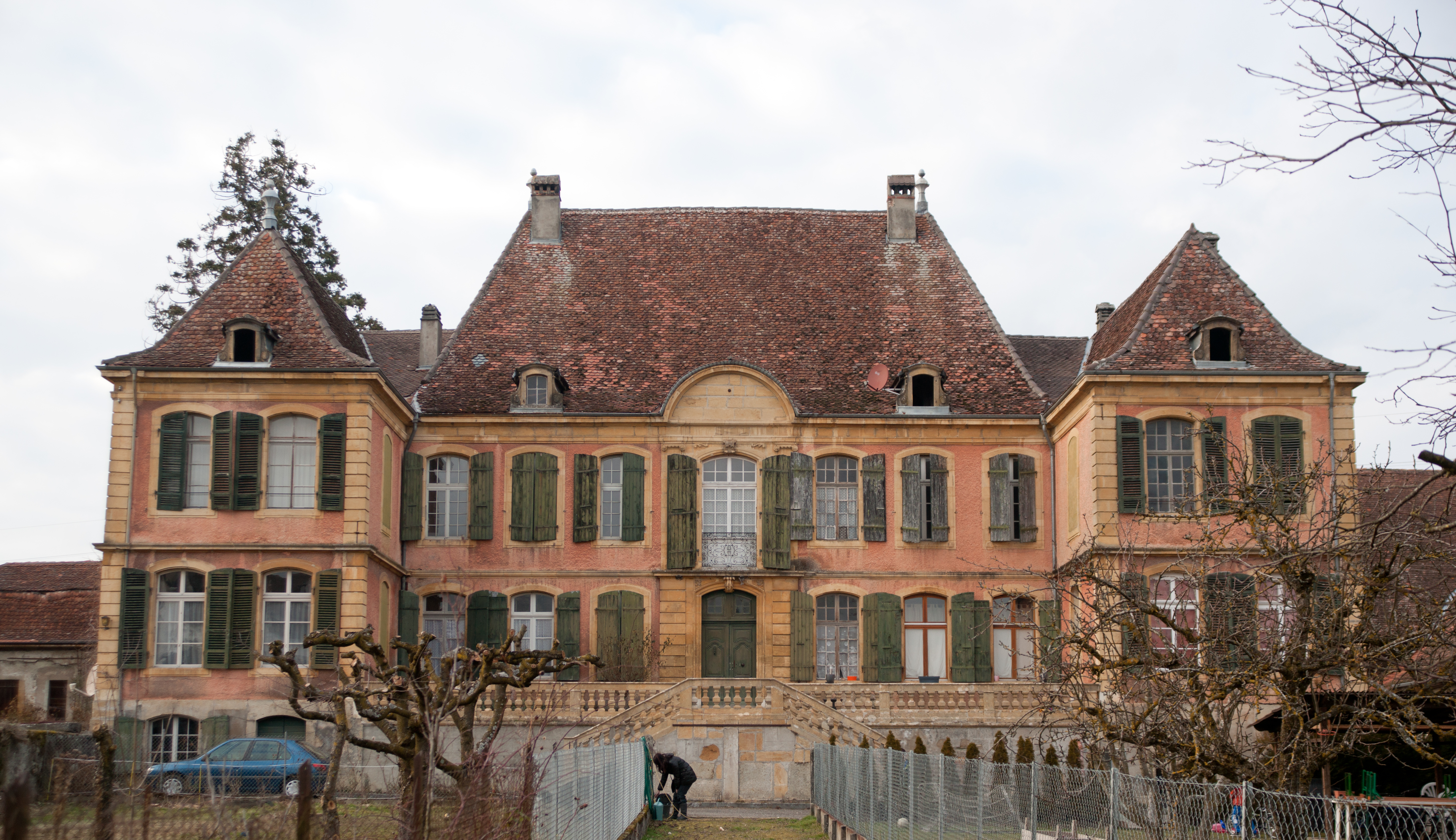 Château de Grancour